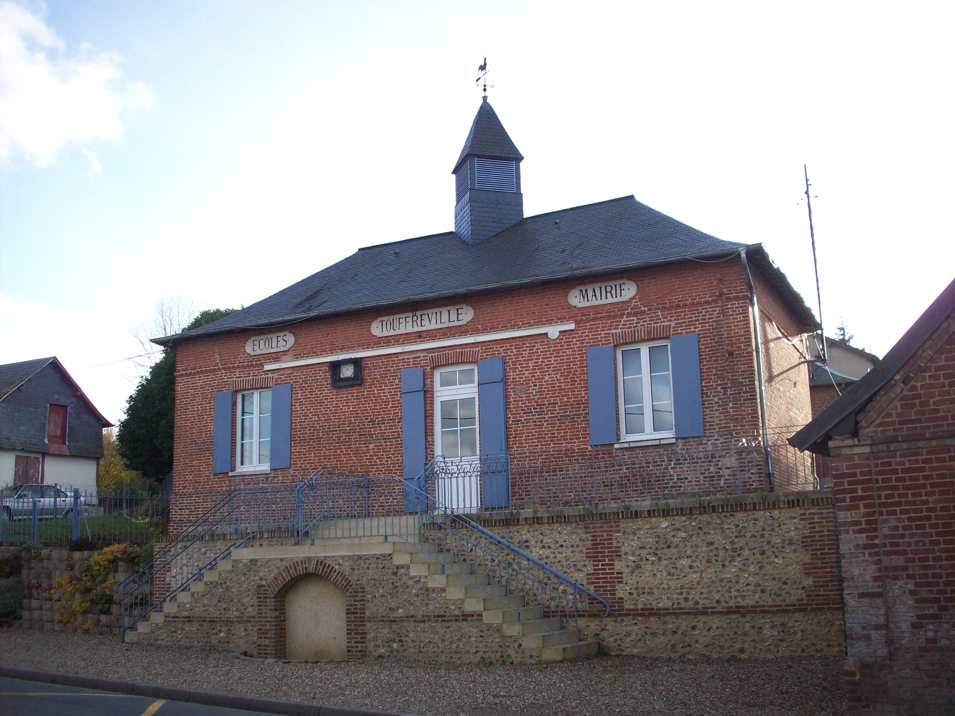 Mairie de Touffreville.